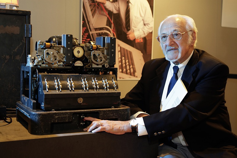 Rudolf F. Staritz im Heinz Nixdorf MuseumsForum in Paderborn.